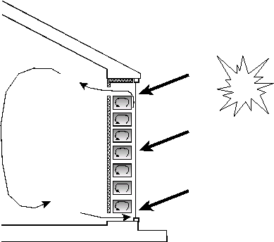 Esquema de funcionamiento de un muro de agua utilizado en la arquitectura bioclimática.